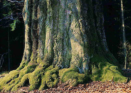 Der mächtige Stamm der "Nigerlbuche" bei Neualbenreuth Fotograf: Walter J. Pilsak, Waldsassen Copyright Status: GNU Freie Dokumentationslizenz